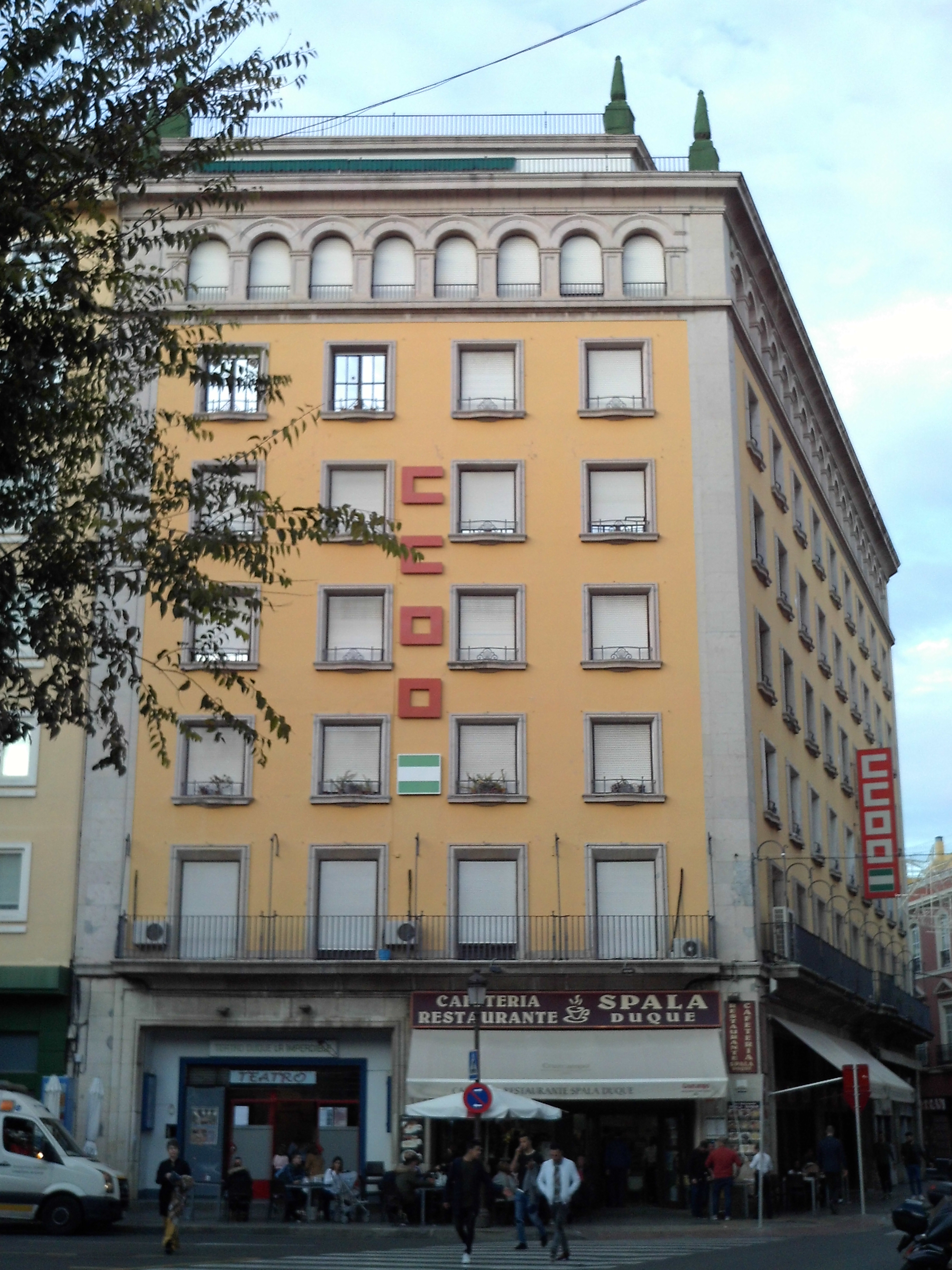 Sede de Comisiones Obreras (CCOO) en Sevilla. Andalucía, España.